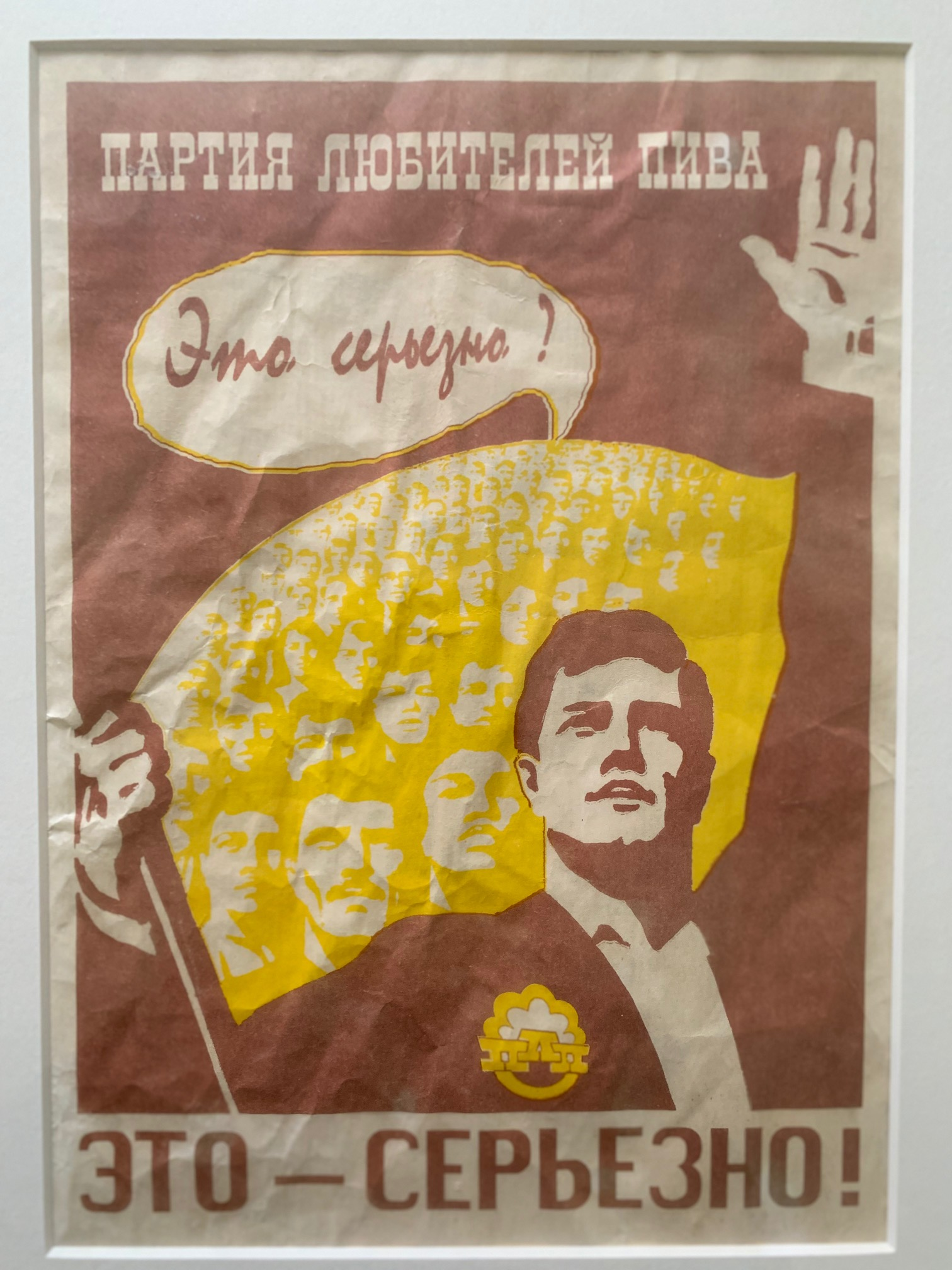 партия любителей пива